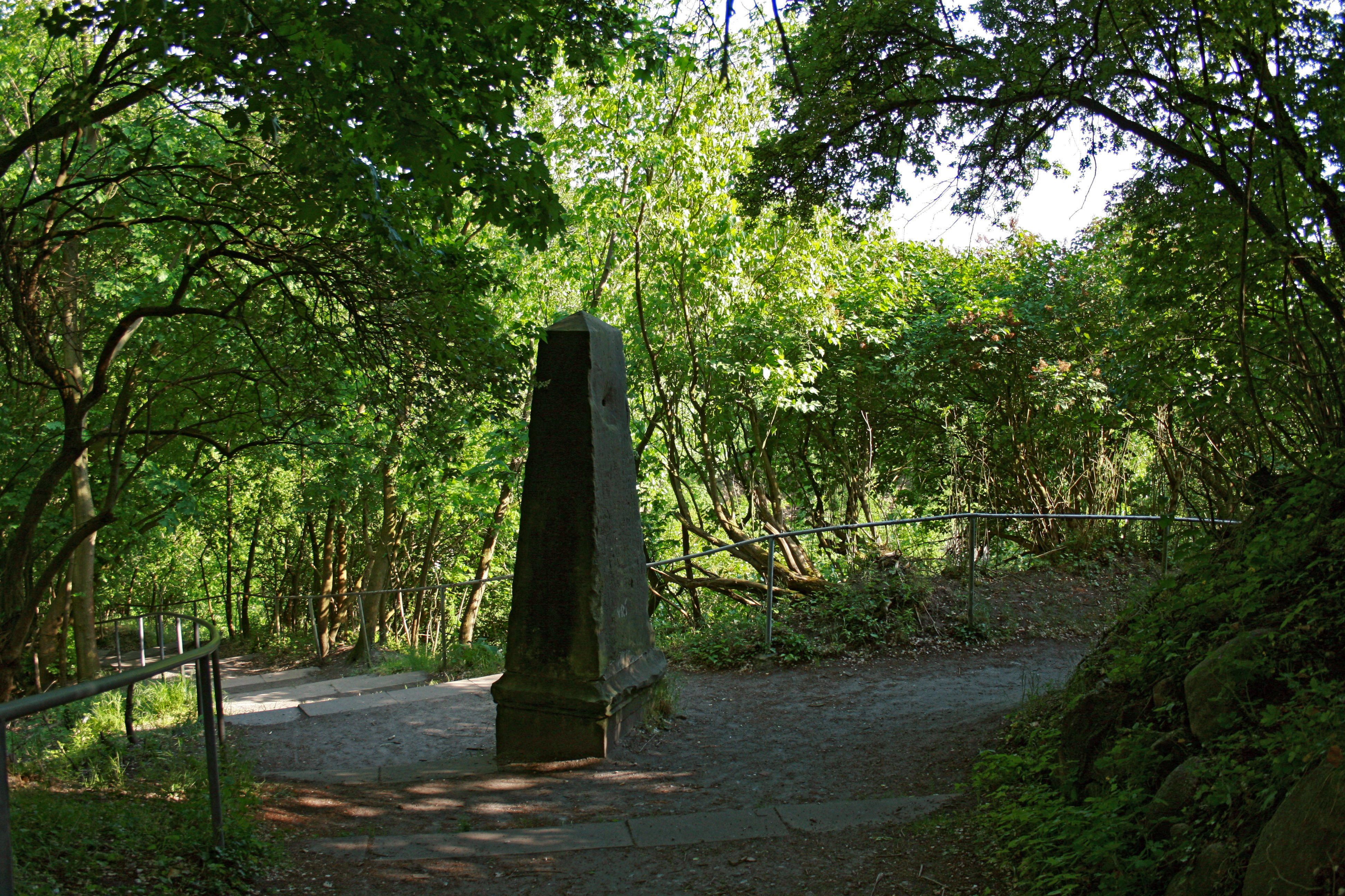 Lüneburger Kalkberg in Lüneburg